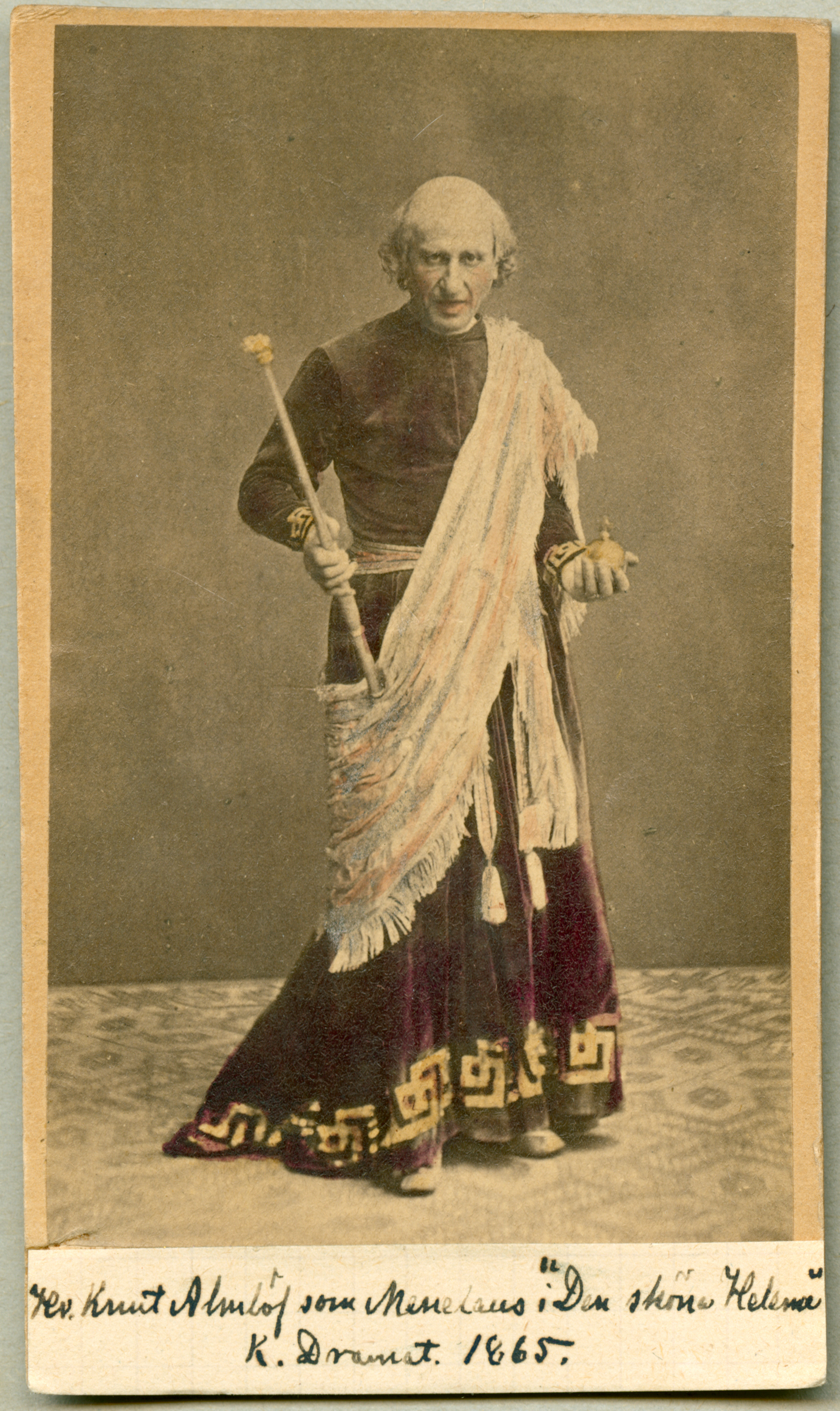 Knut Almlöf som Menelaus i Den sköna Helena, Kungliga Dramatiska teatern 1865